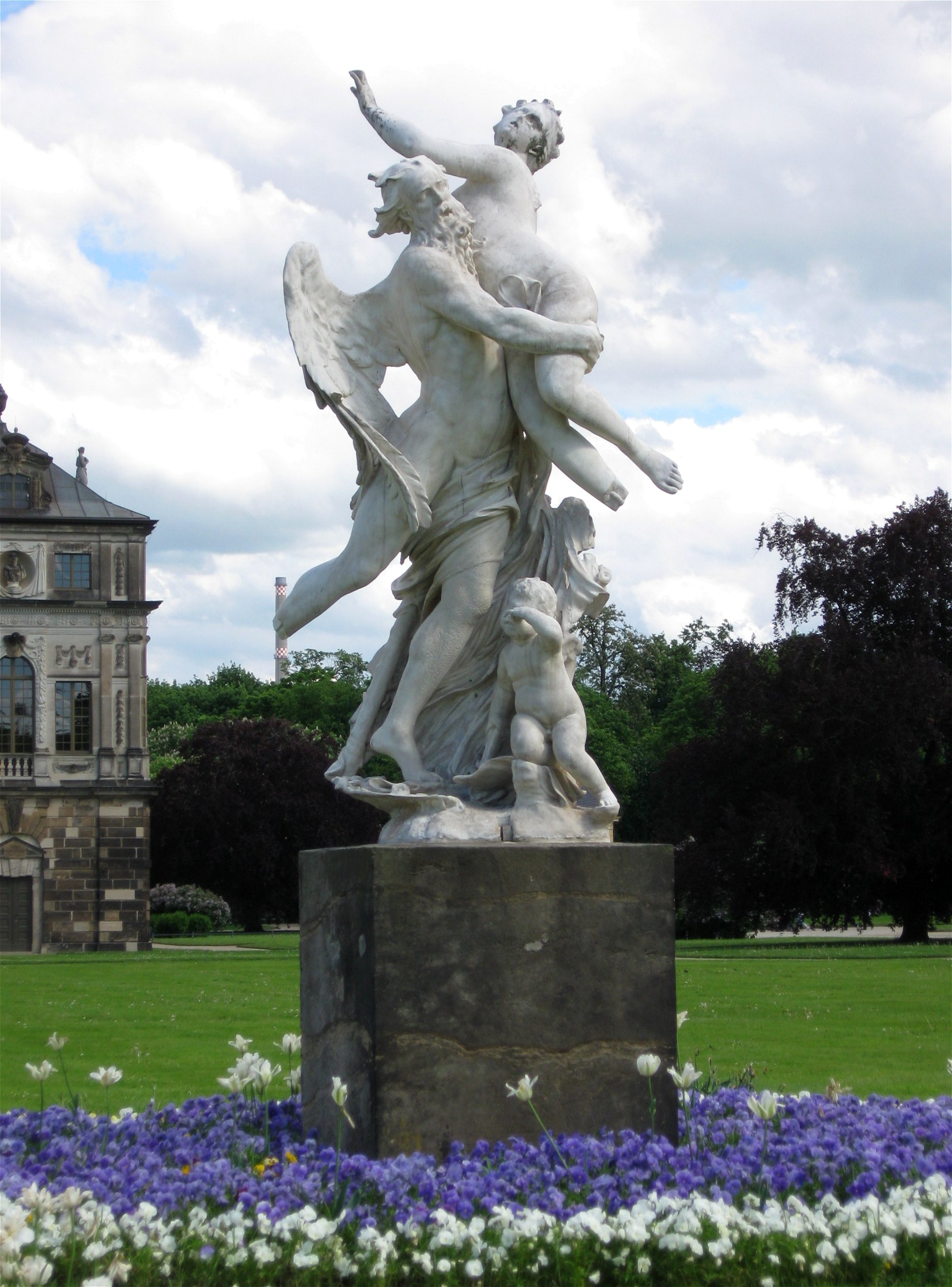 Skulptur Die Zeit entführt die Schönheit von Pietro Balestra, Großer Garten, Dresden